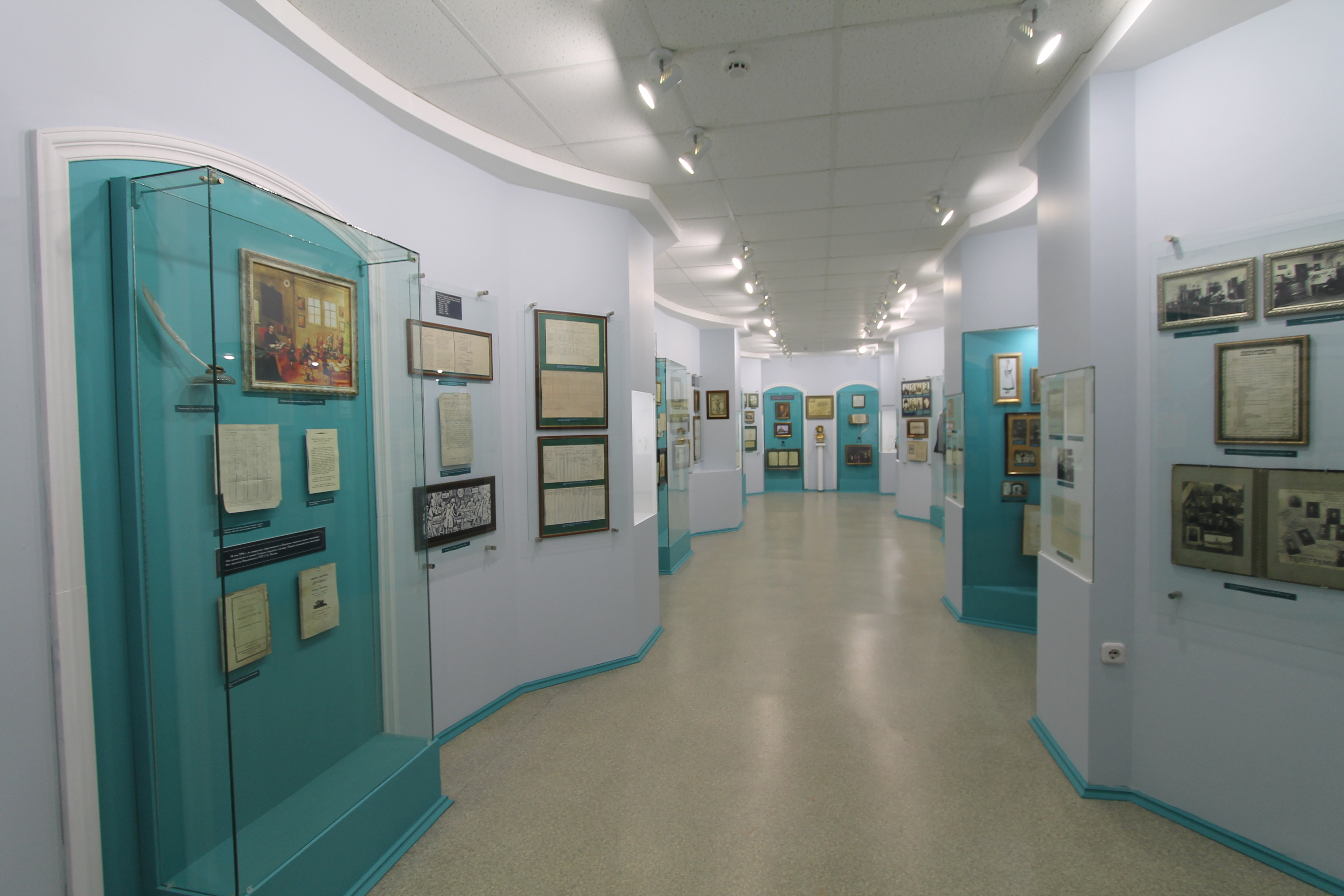 Экспозиция зала 1